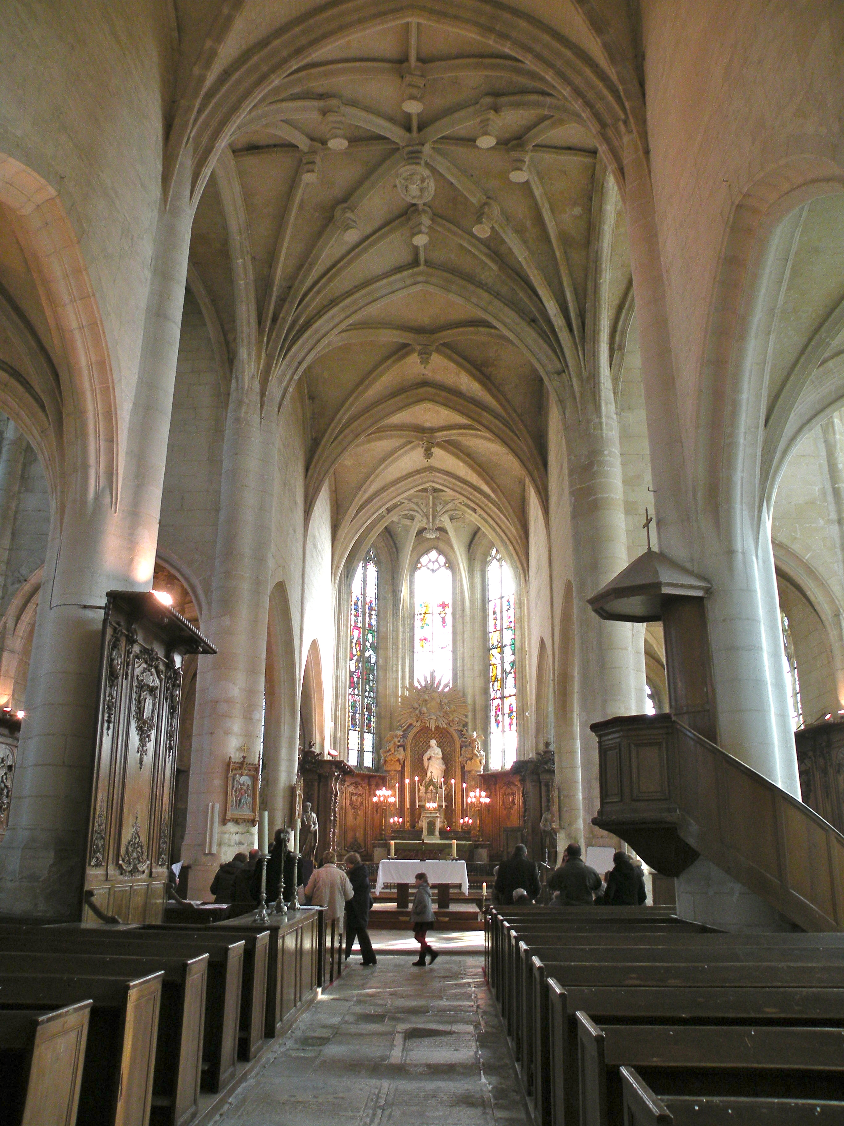 Église Saint-Pierre-et-Saint-Paul de Baron, troisième travée de la nef, vue vers l'est.